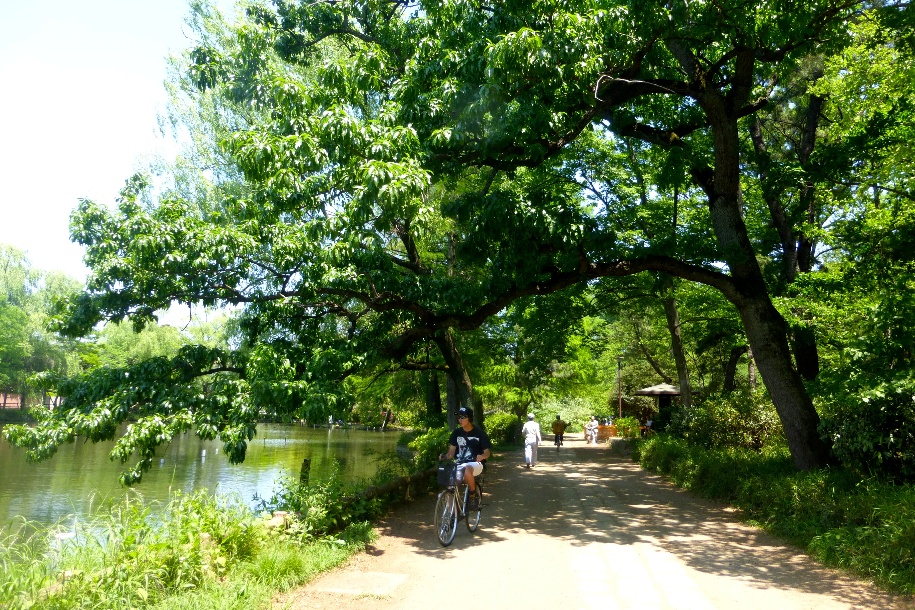 Shakujii Park (石神井公園)